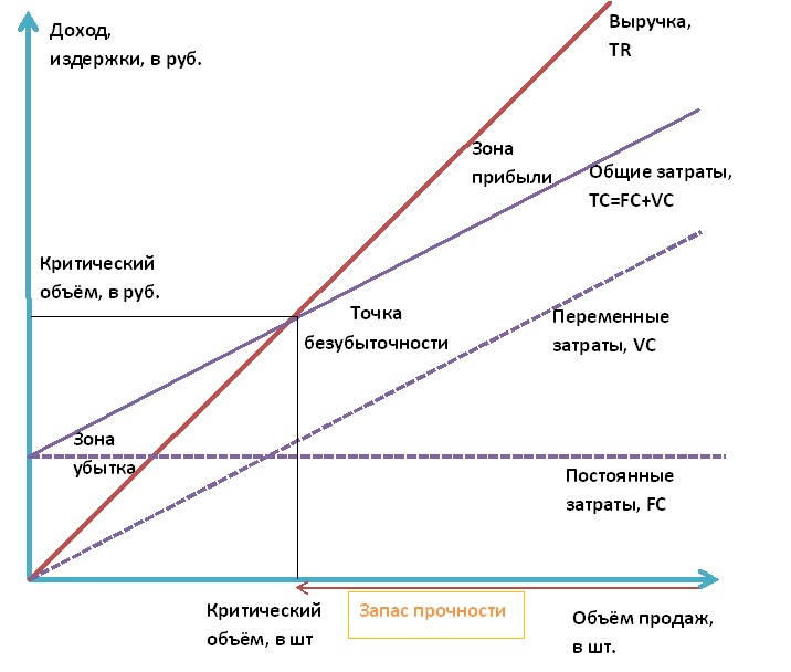 Точка безубыточности (линейные функции)